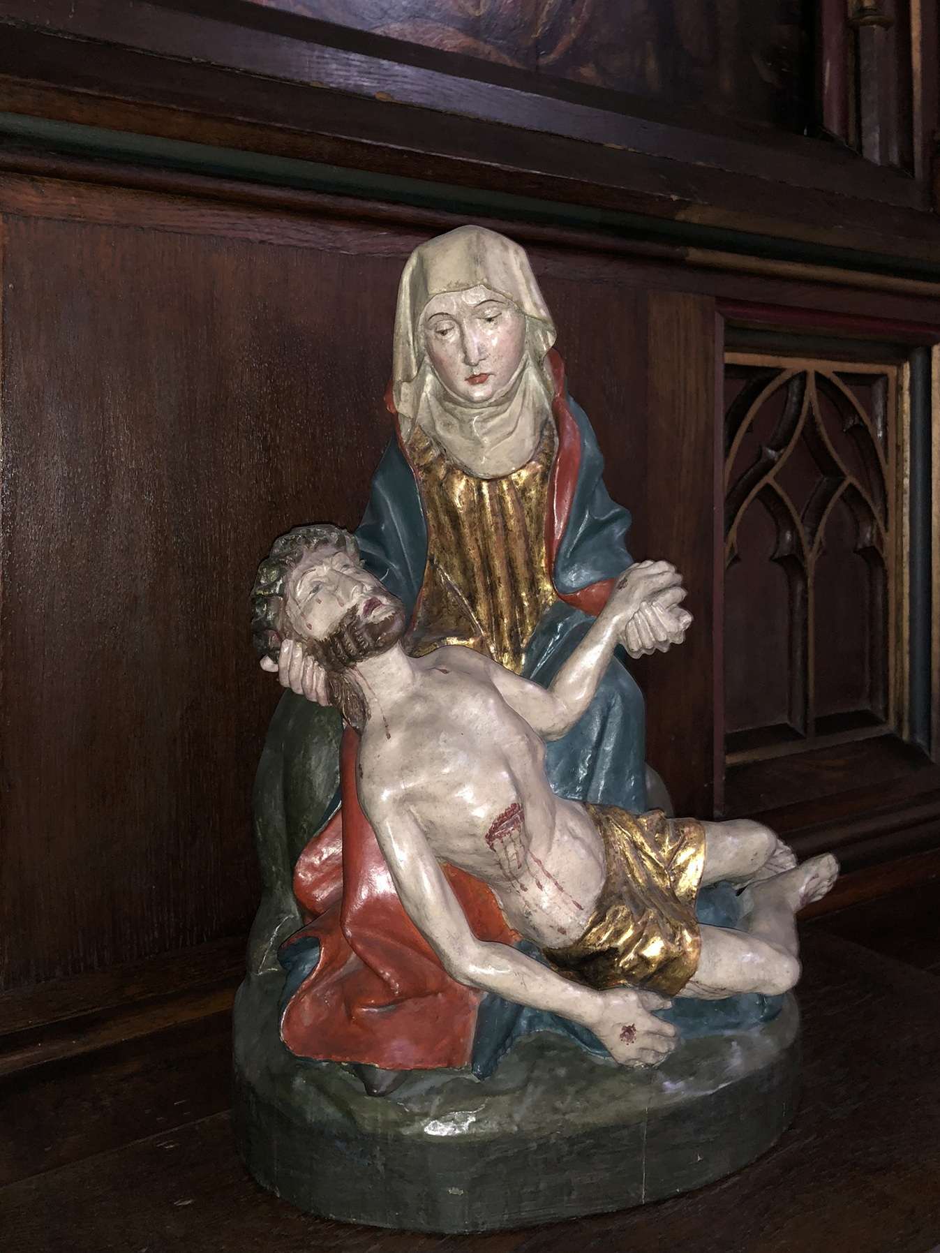 kleine Pieta in der romanischen Kirche: St. Maria Lyskirchen in Köln